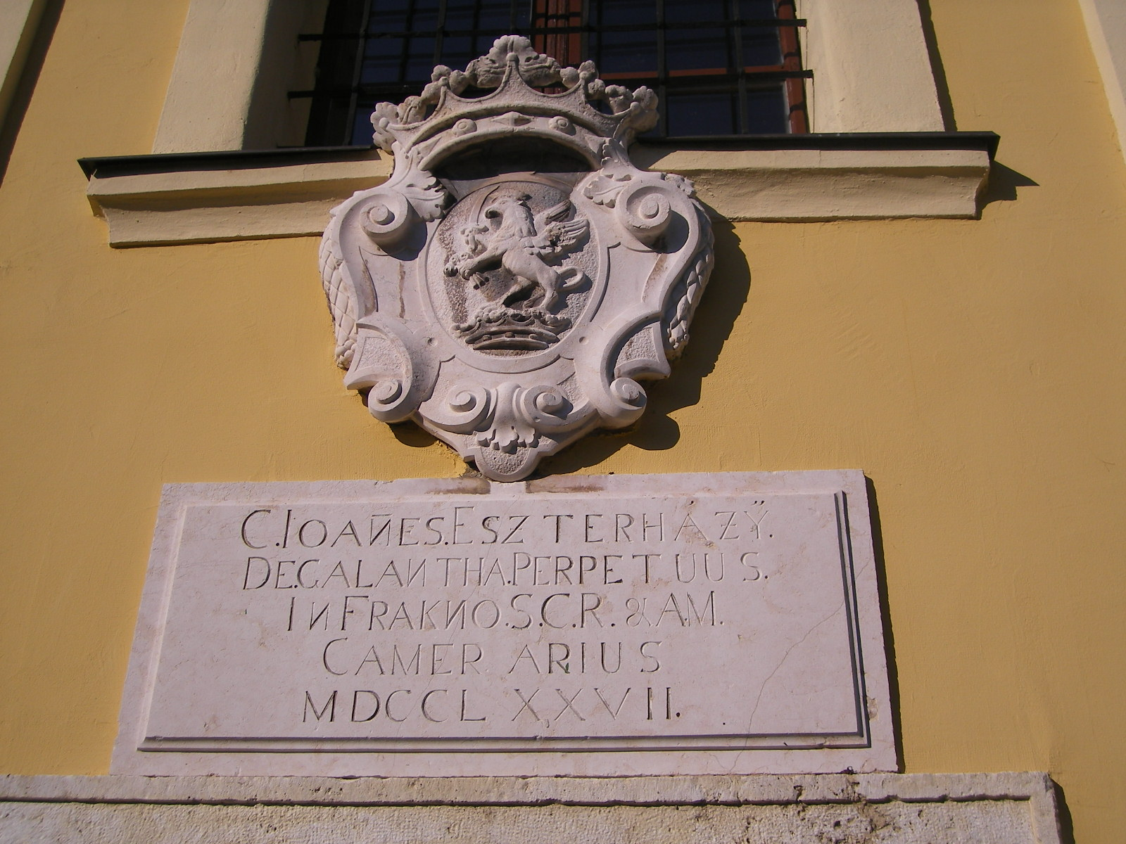 Nagyigmánd - katolikus templom (részlet)